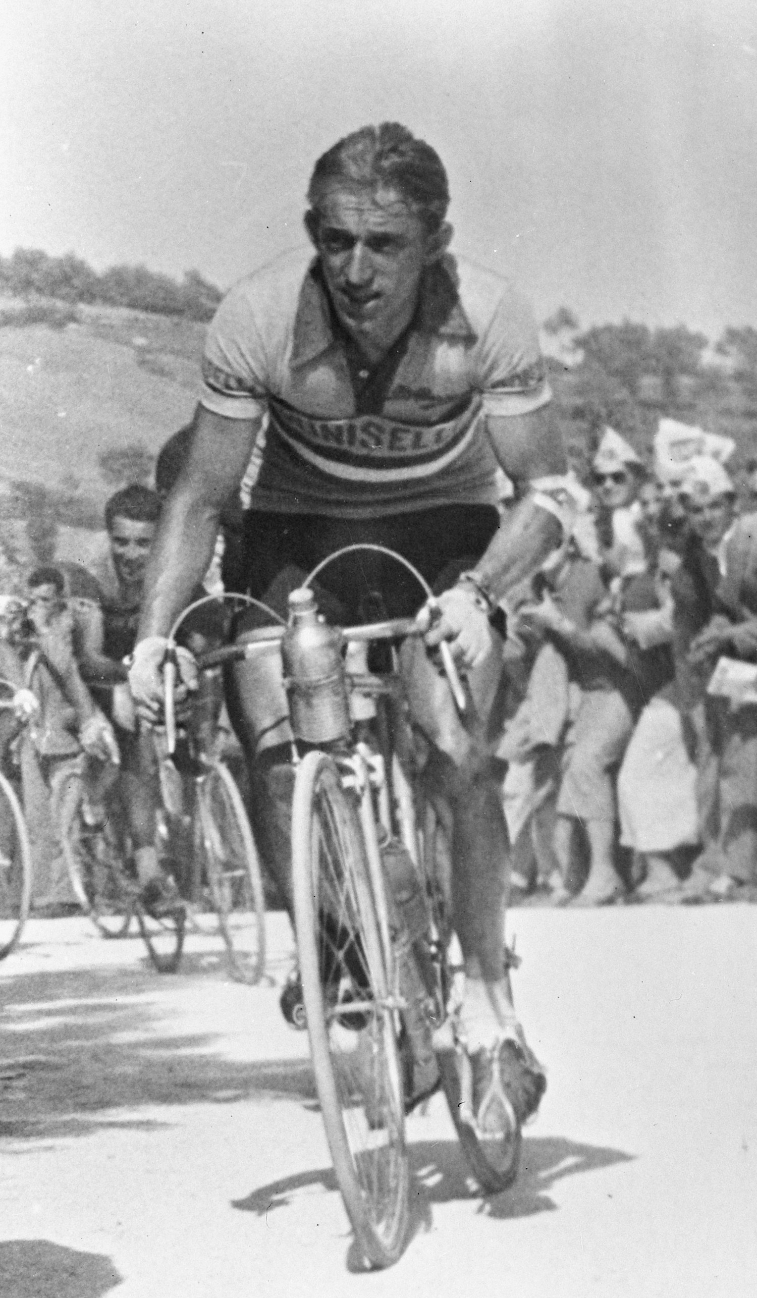 Wout Wagtmans in de Ronde van Italie